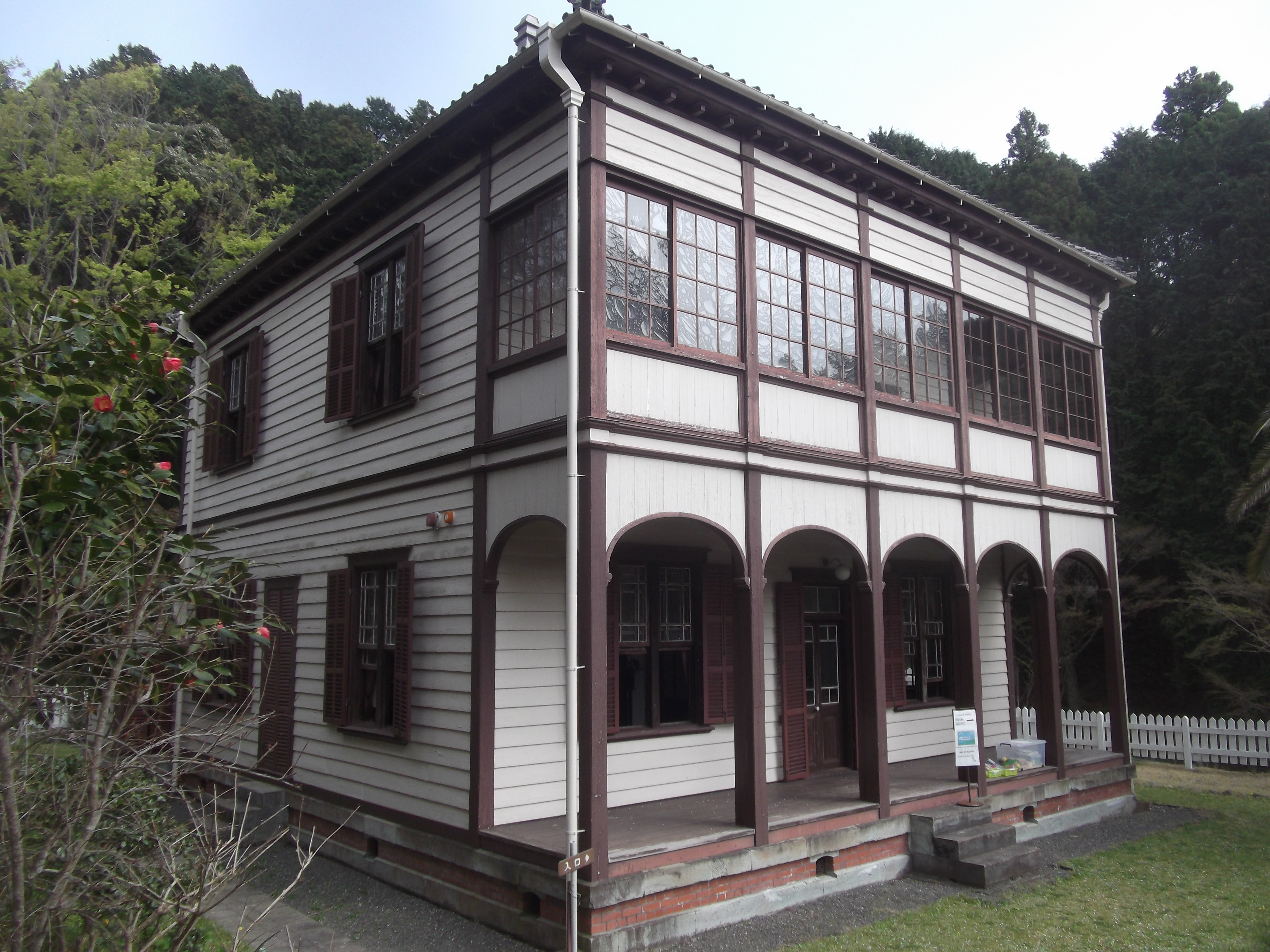 旧エンバーソン邸。斜めからのファサード。